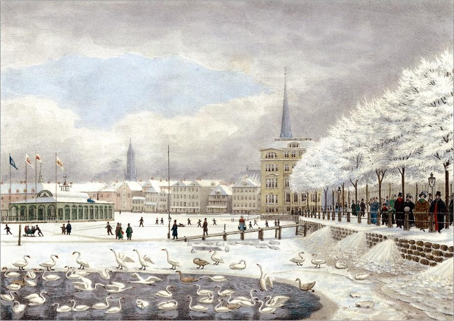 Die Binnenalster in Hamburg. Rechts der alte Jungfernstieg. Hinten Hotelgebäude ("Hotel Belvedere" an der heutigen Reesendammbrücke) und darüber die Turmspitze von Hauptkirche St. Petri. Im Hintergrund links die direkt an der Binnenalster liegenden Häuser (Zuchthausstraße, heute der davor angelegte Ballindamm) und Kirchturm St. Jacobi. Auf der Alster, die per Boot zu erreichende Badeanstalt mit Hamburger Flaggen in alter Farbgebung (Neubau seit 1810, an dieser Stelle bereits zuvor Badeschiff seit 1793).